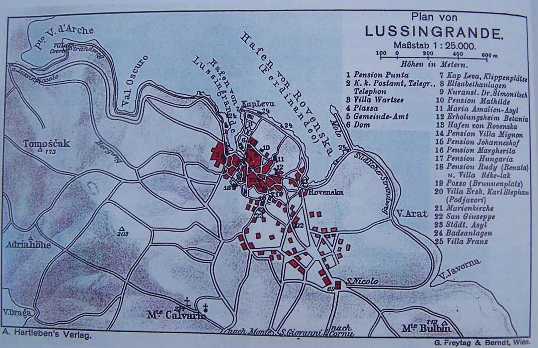 Plan der Stadt (1912)